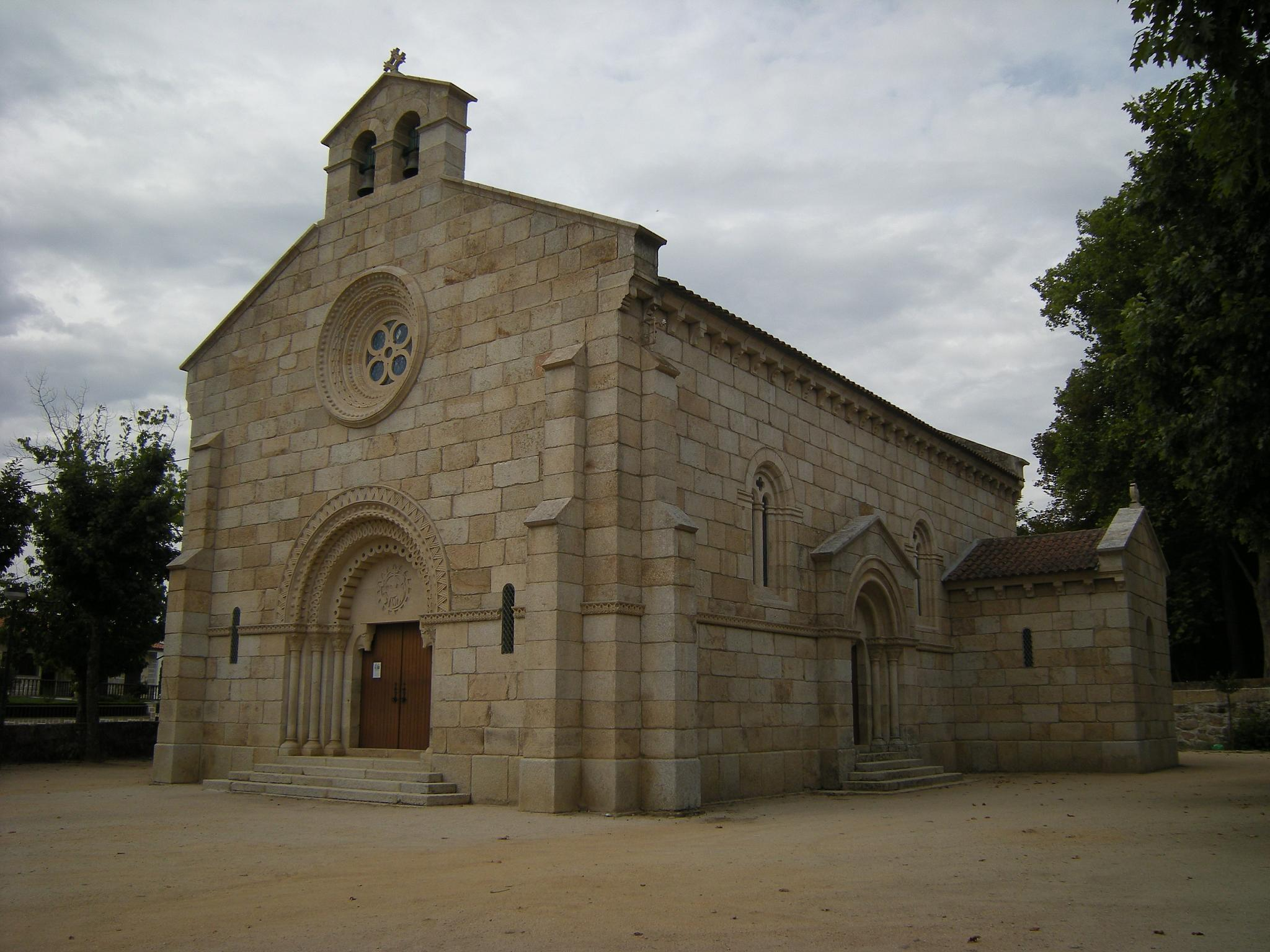 Igreja de Nossa Senhora da Conceição de Vidago (século XX) - Chaves - Portugal